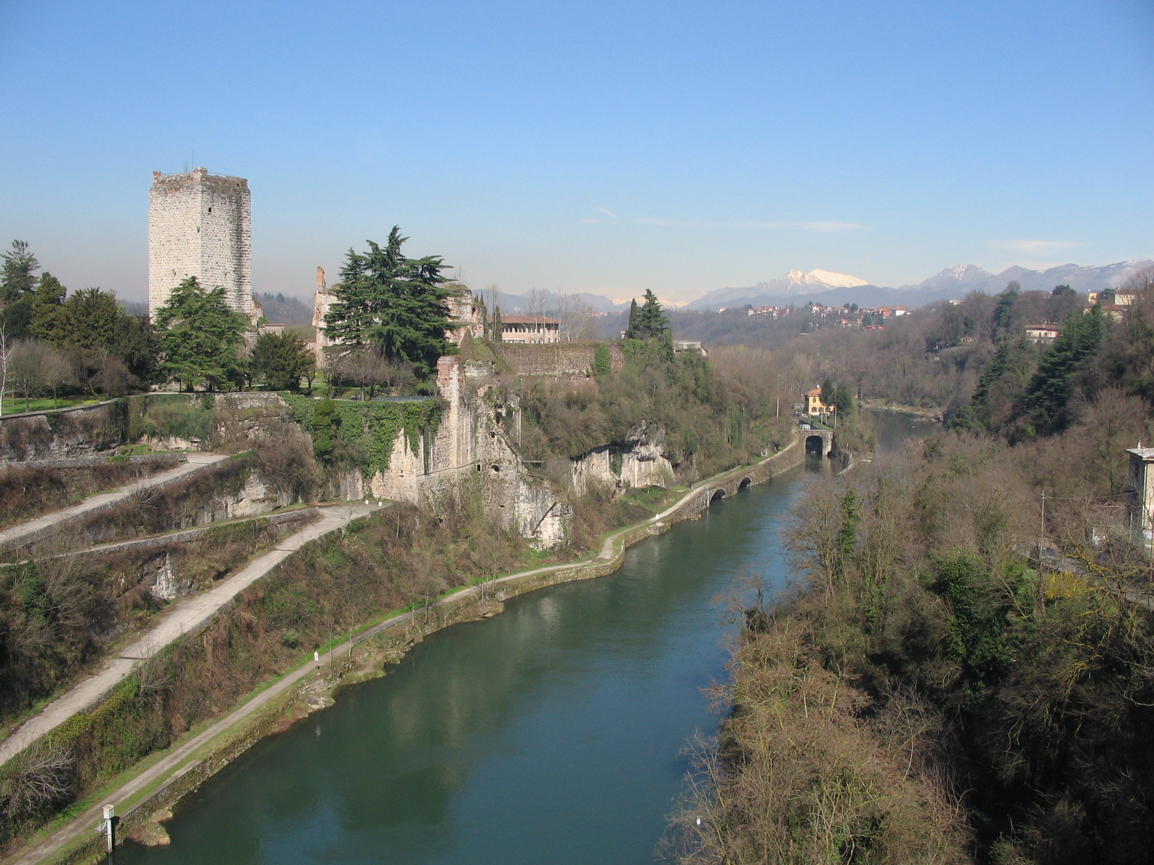 Il castello visconteo, prigione di Bernabò Visconti, a Trezzo sull'Adda e il Fiume Adda, Lombardia, Italia. Autore Giorces.